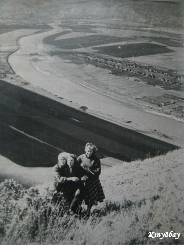 Башҡортса: Кинйәбай ауылы